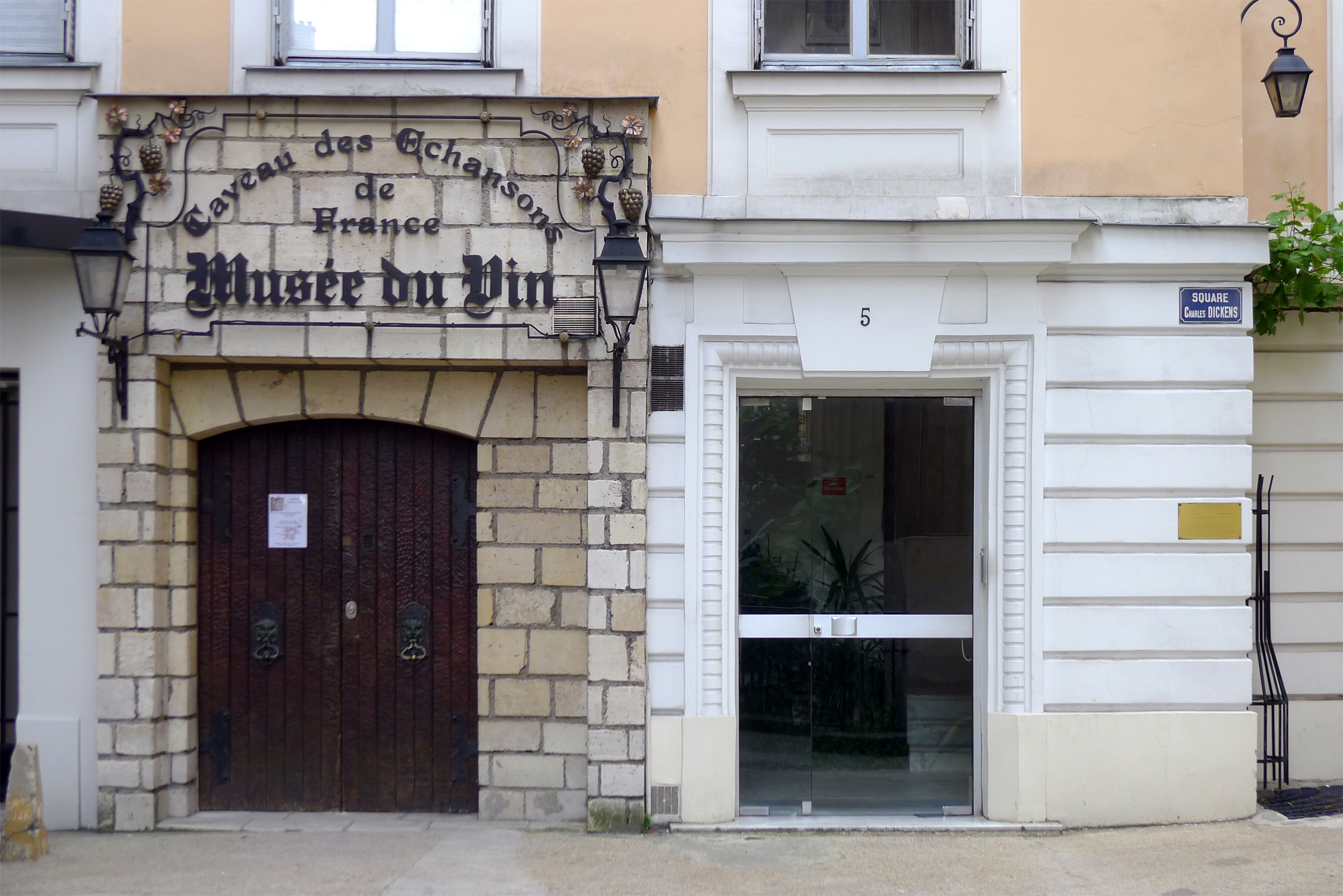 Square Charles-Dickens (musée du vin) - Paris XVI